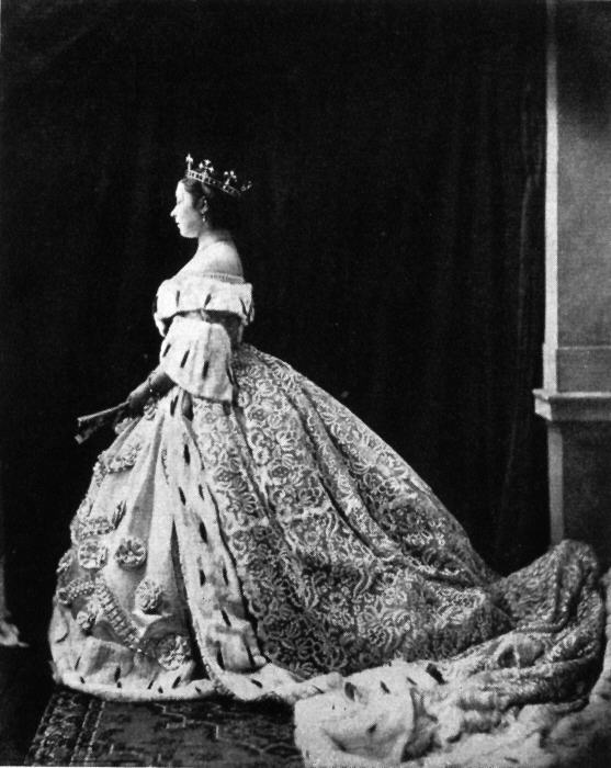 Vitória, Princesa-herdeira-consorte da Prússia em trajes oficiais durante a coroação de Guilherme I.